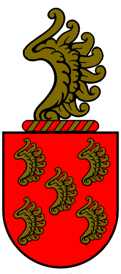 Brasão de Armas da Família Abreu